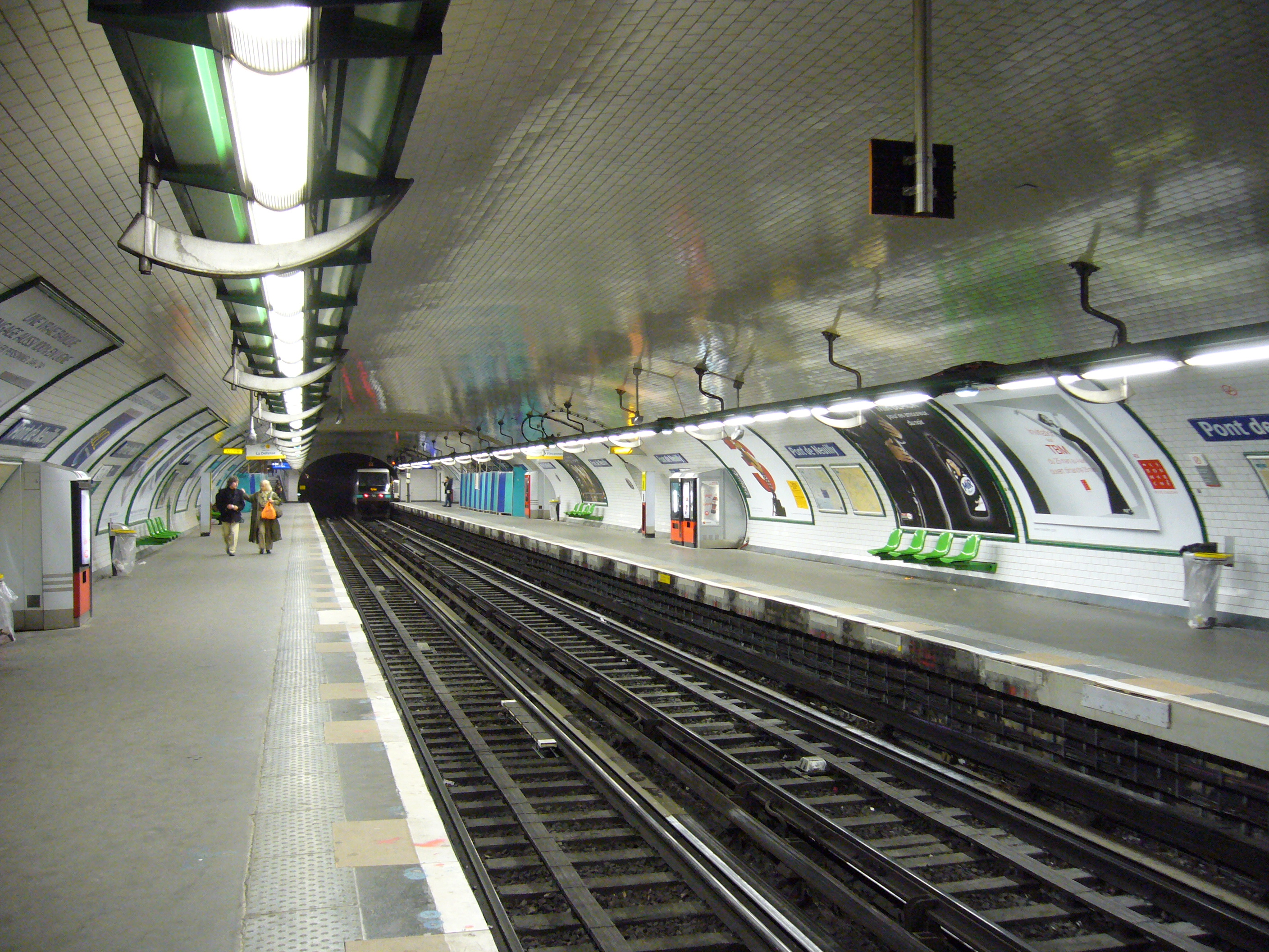 Quais de la station Pont de Neuilly sur la ligne 1 du métro de Paris.